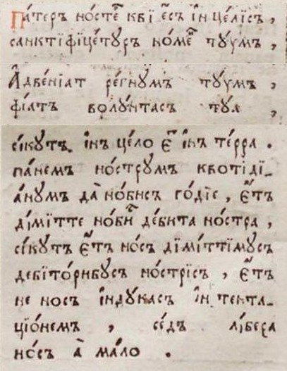 Pater noster Cyrillice conscriptus, e Dictionario trillingui Theodori Polikarpov, Moscuae 1701.